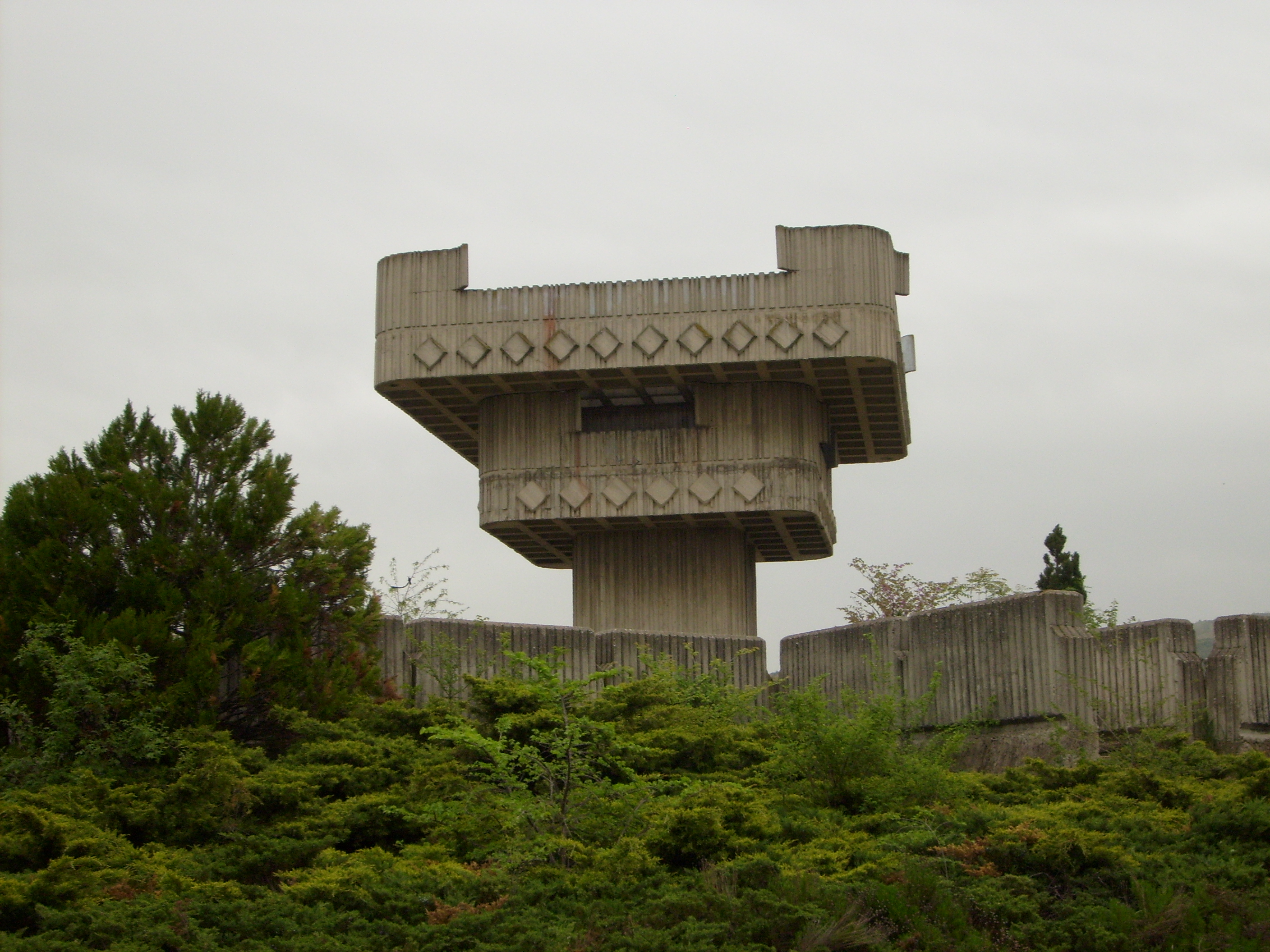 Споменот костурница во Кавадарци